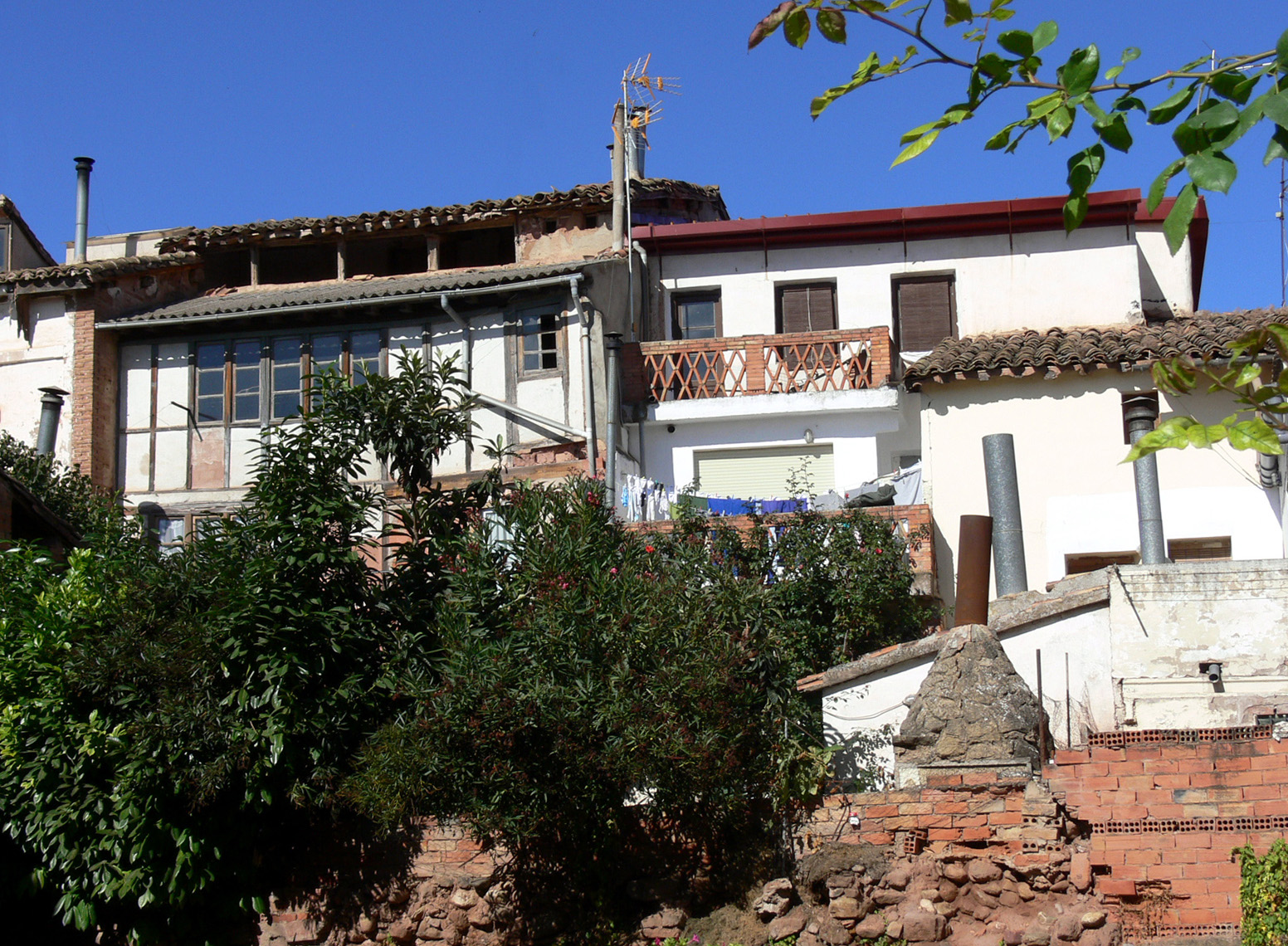 Hormilla, La Rioja - España.